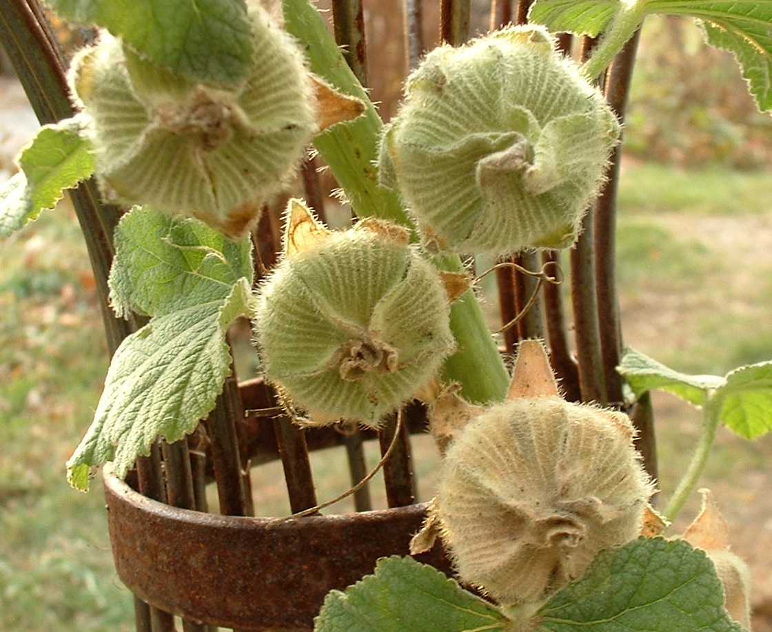 hollyhocks